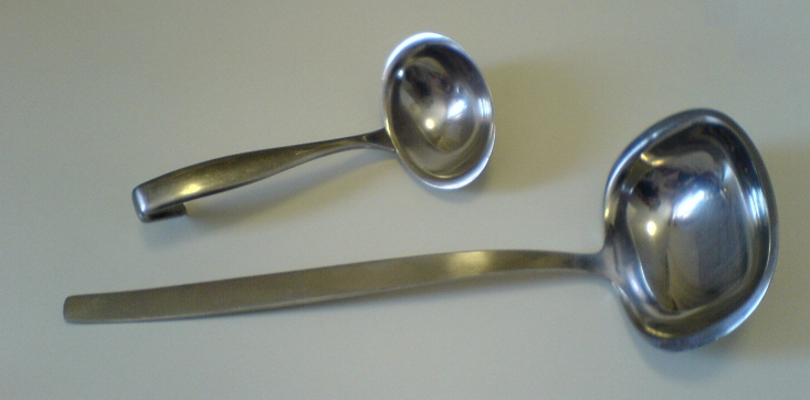 Bild einer Schöpfkelle